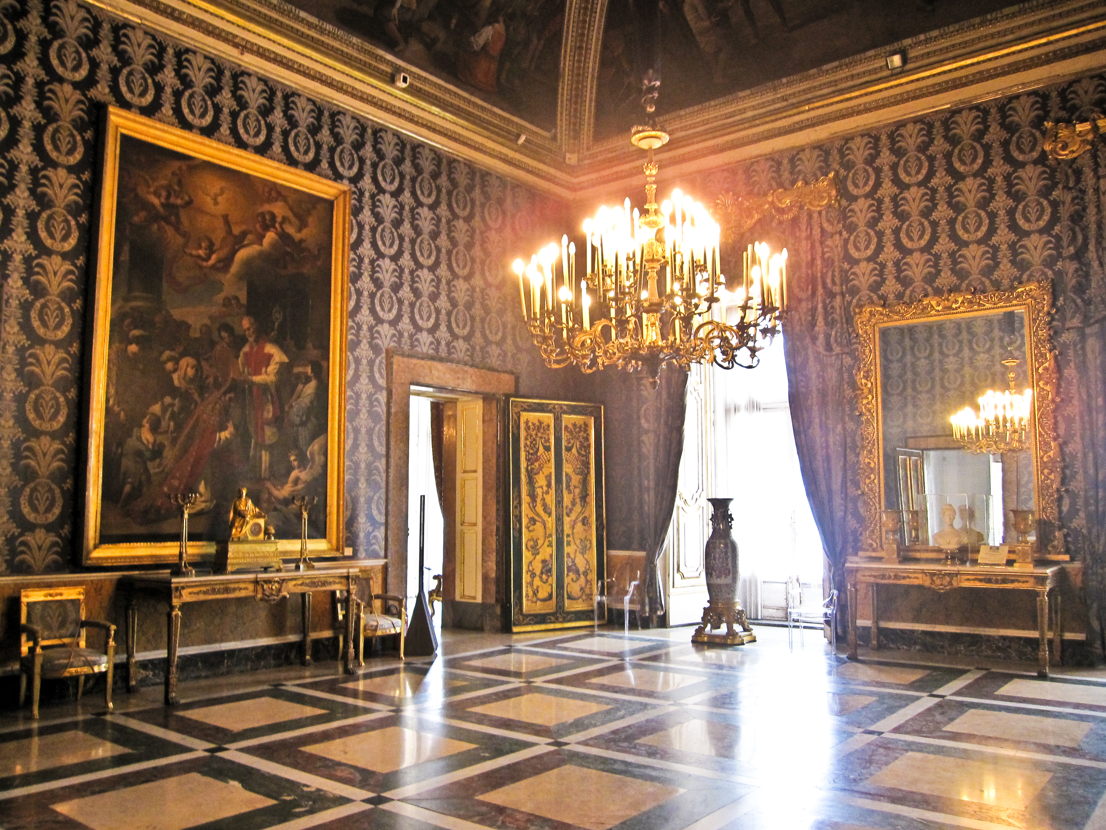 Appartamento storico